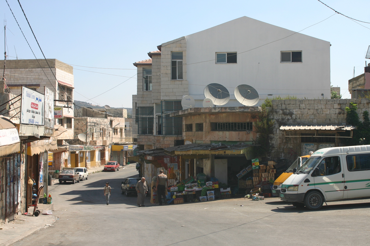 Salfeet, Palästina.